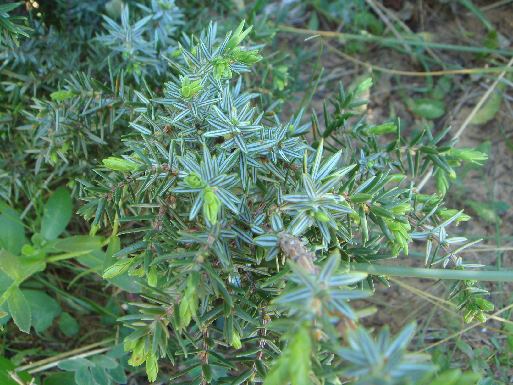 Juniperus macrocarpa (syn. J. oxycedrus subsp. macrocarpa), Chiclana, Cádiz, España